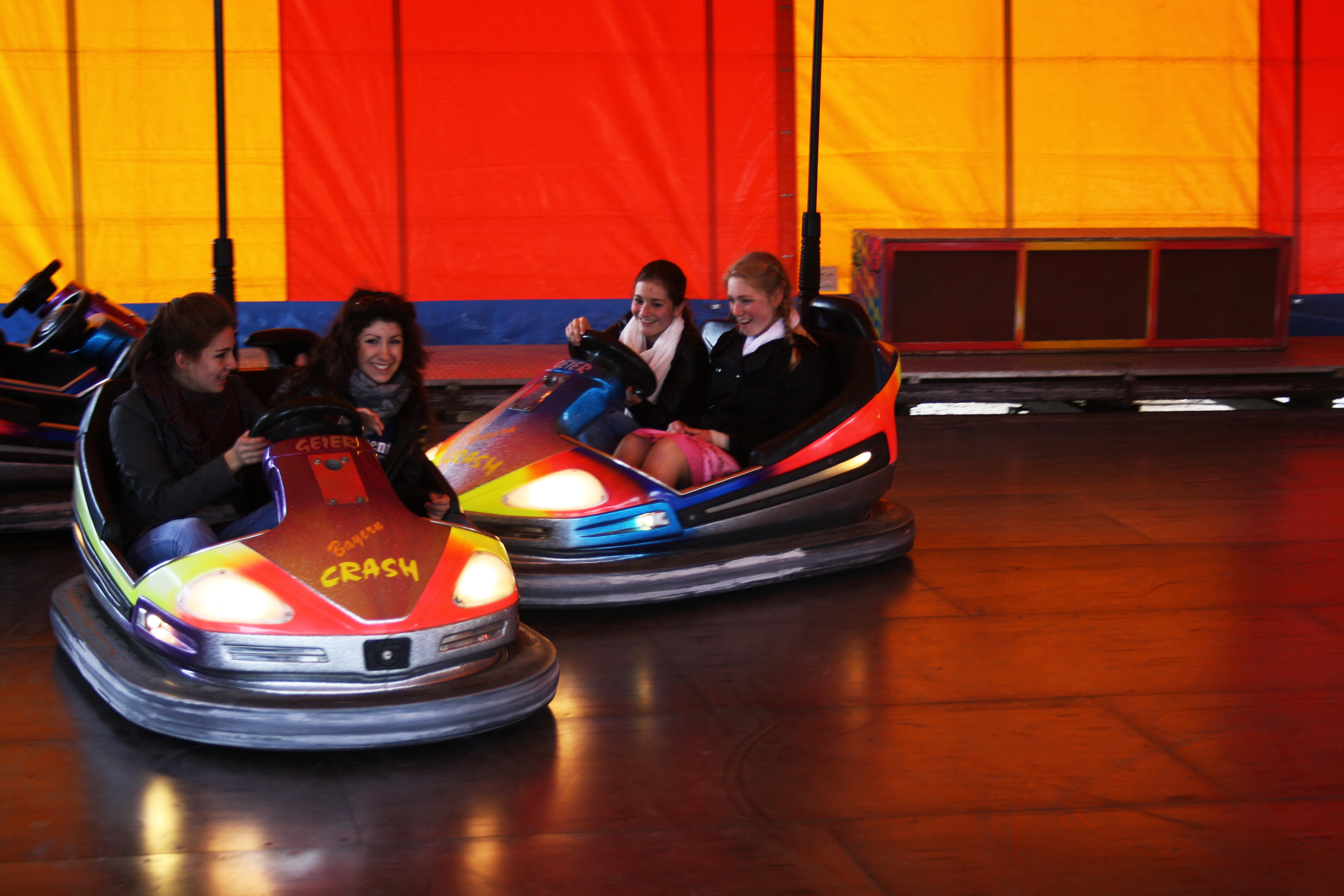 Autoscooter auf dem Frühlingsfest in München.